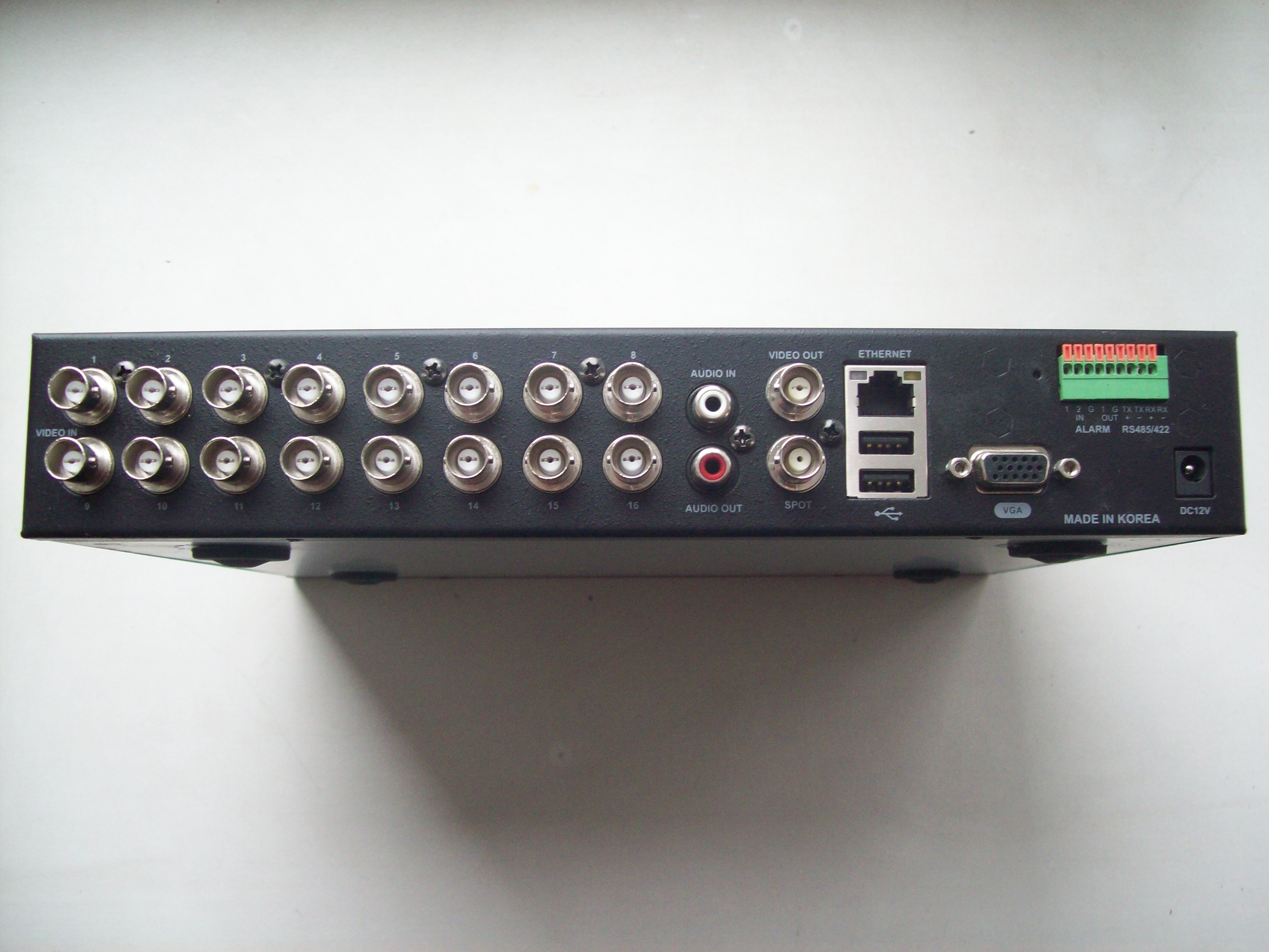 Знято фотоапаратом Кодак